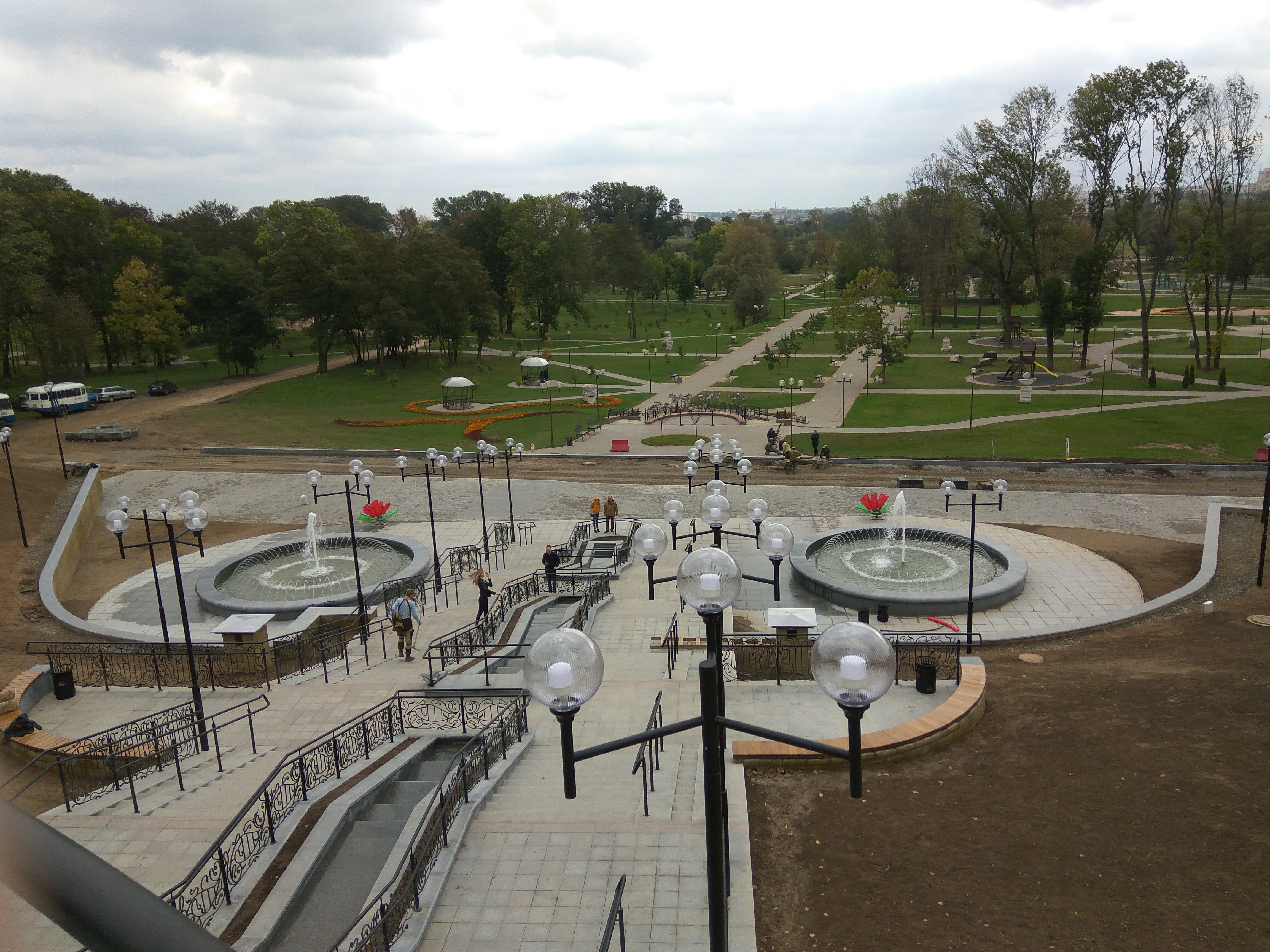 Магілёў. Лесвіца ў Падміколле